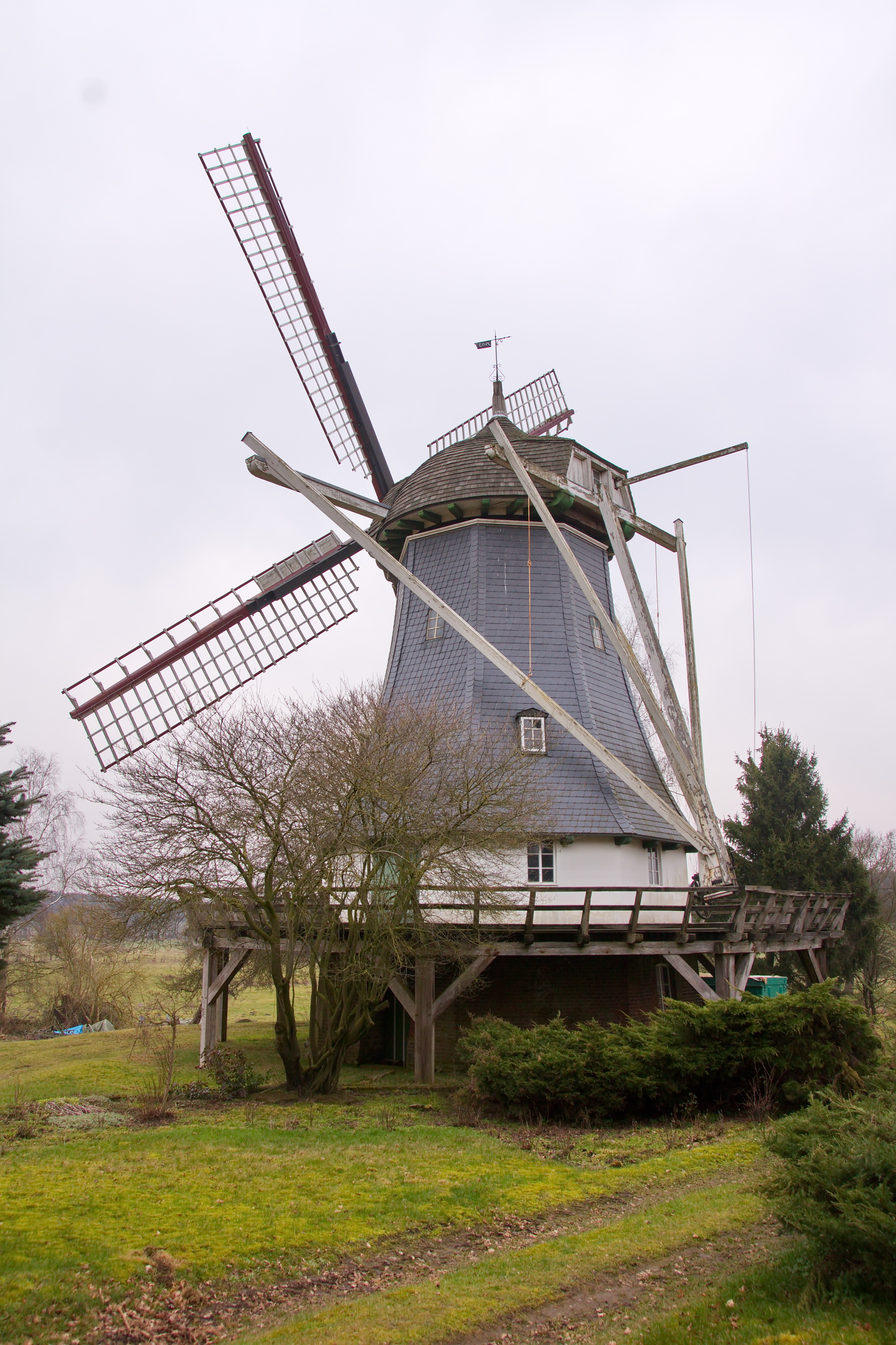 Galerieholländerwindmühle Schmomühle in Brunsbrock (Kirchlinteln), Niedersachsen, Deutschland